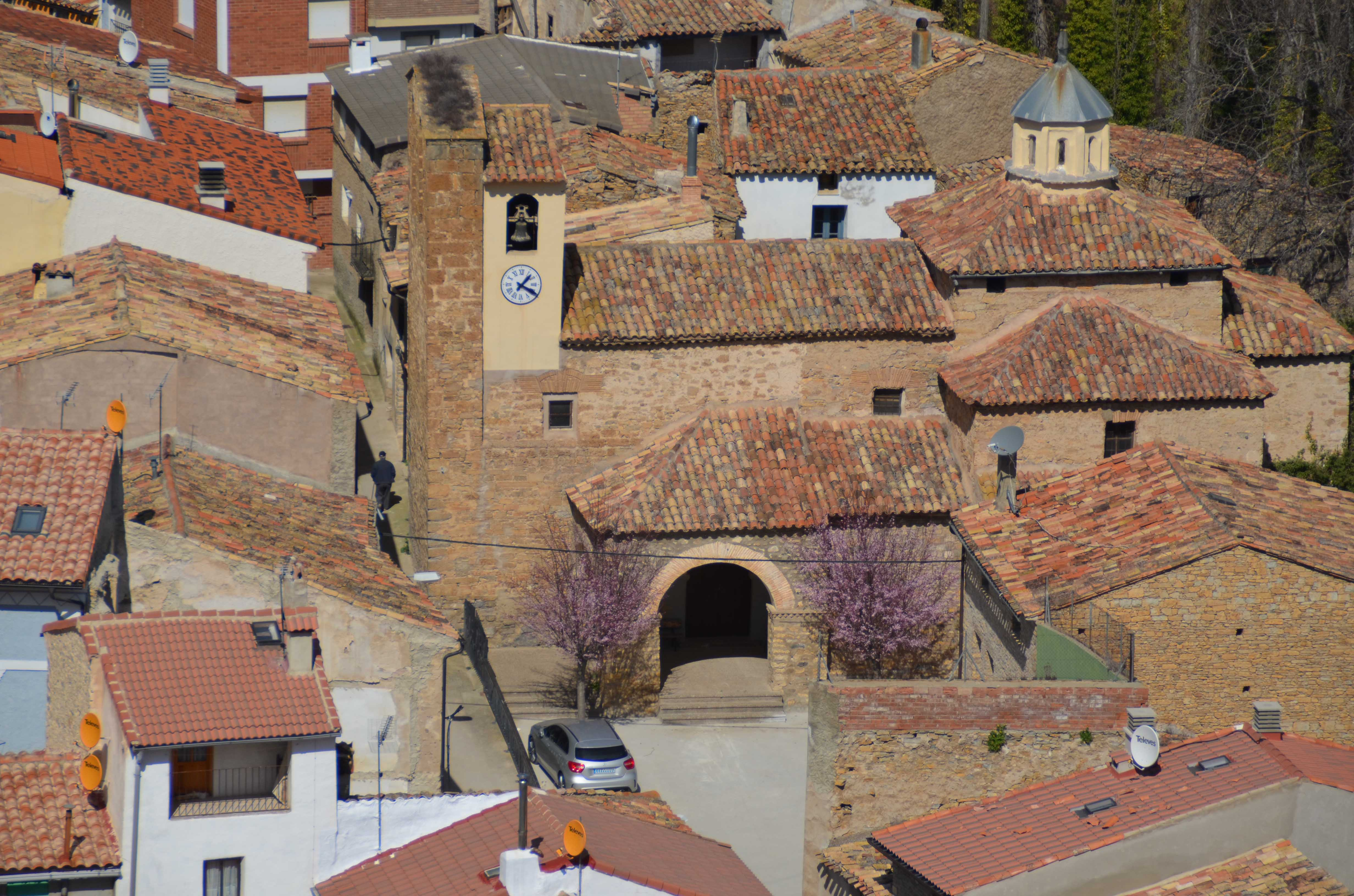 CIGUDOSA